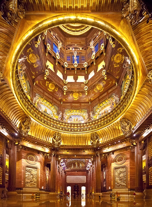 无锡灵山大佛梵宫